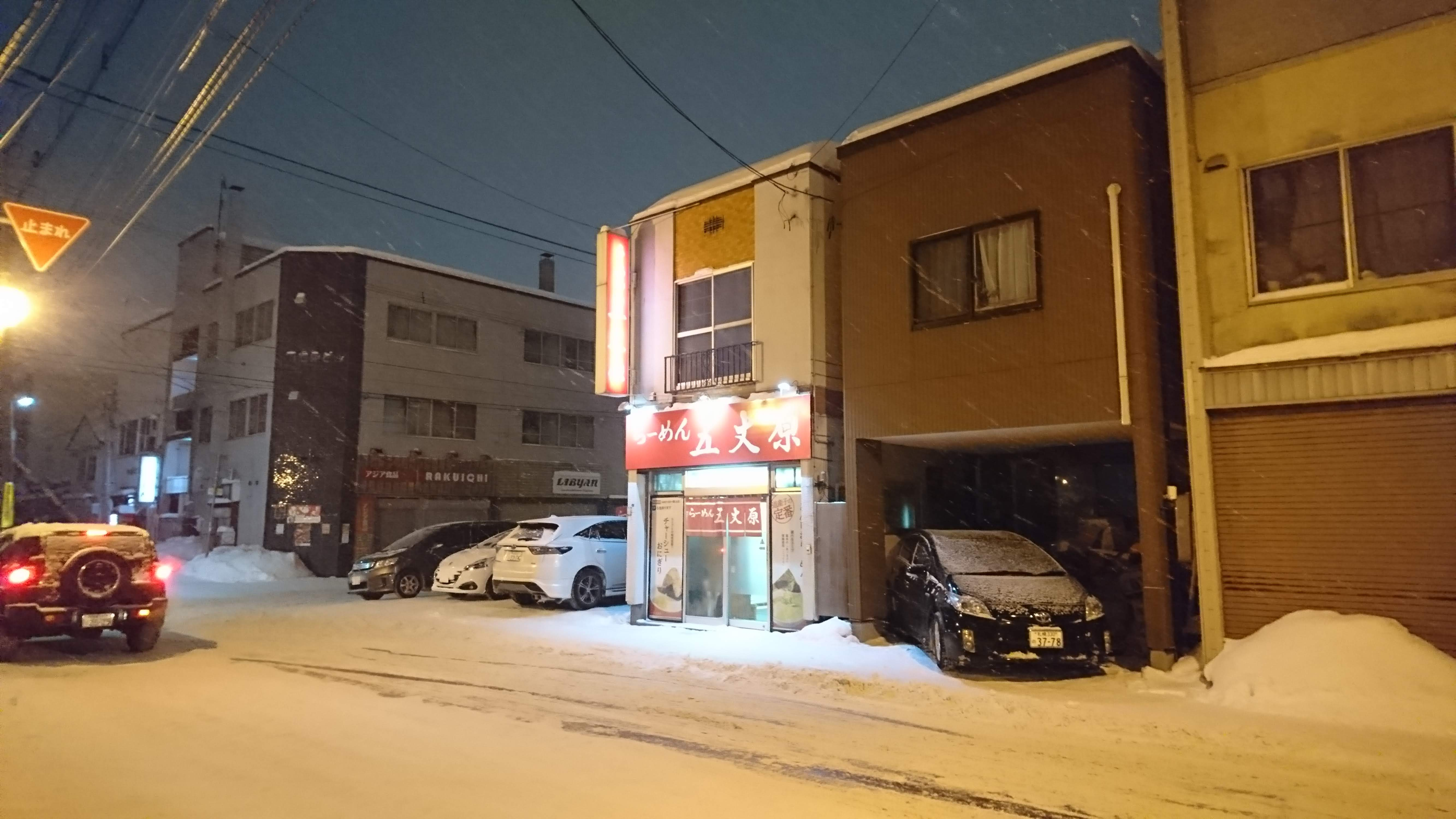 北海道札幌市のラーメン店「らーめん五丈原」本店の写真